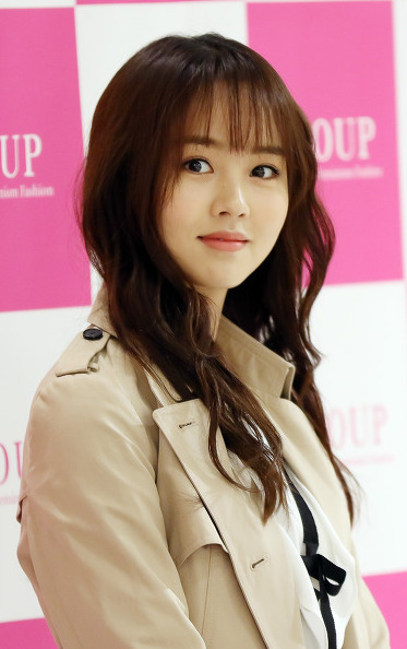 160924 SOUP 김소현 팬사인회.